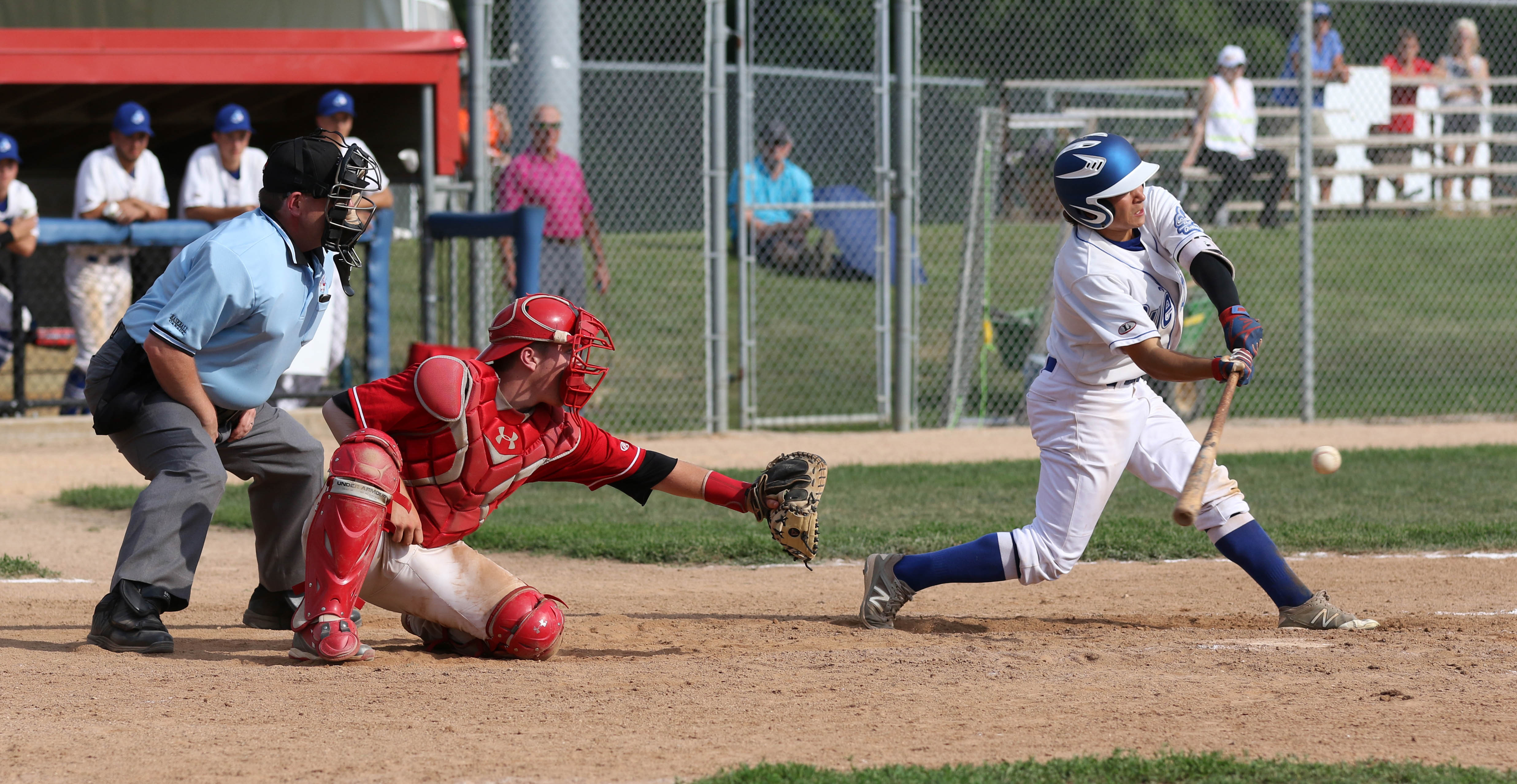 2017-07-29-Darryl Gershman Baseball-34.jpg